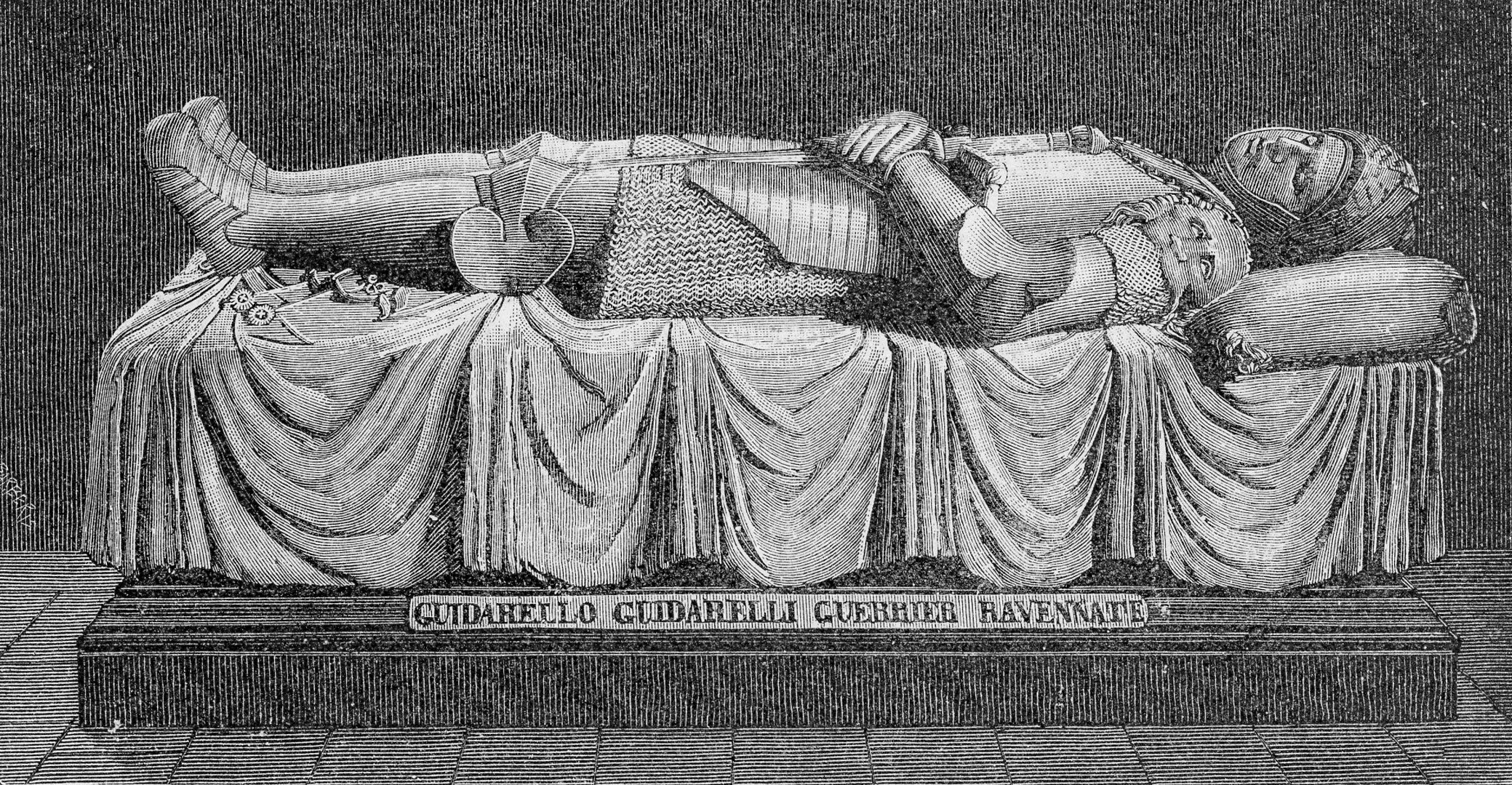 Ravenna: statua del guerriero Guidarello Guidarelli (xilografia di Giuseppe Barberis).